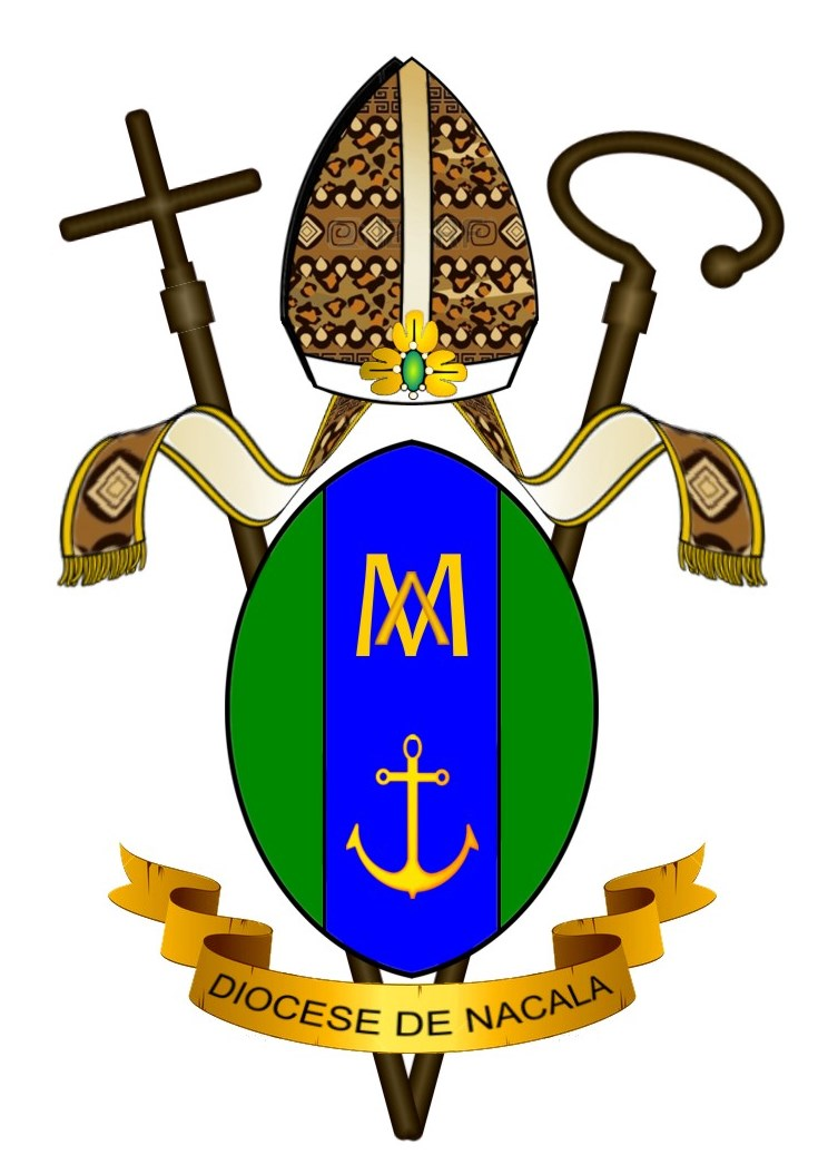 brasão da diocese de Nacala